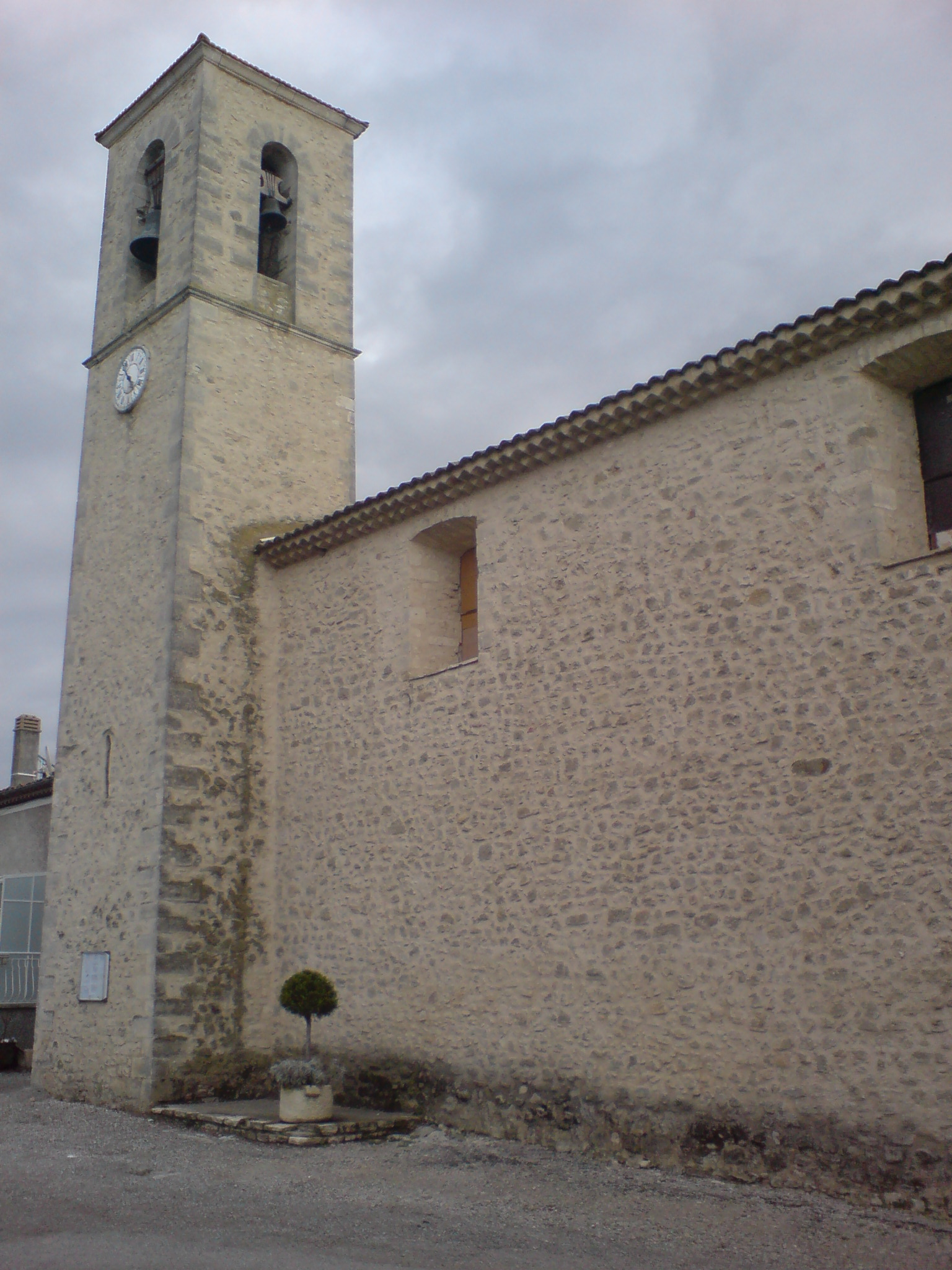 Information Description: Église de Niozelles (Alpes-de-Haute-Provence) Date: voir métadonnées